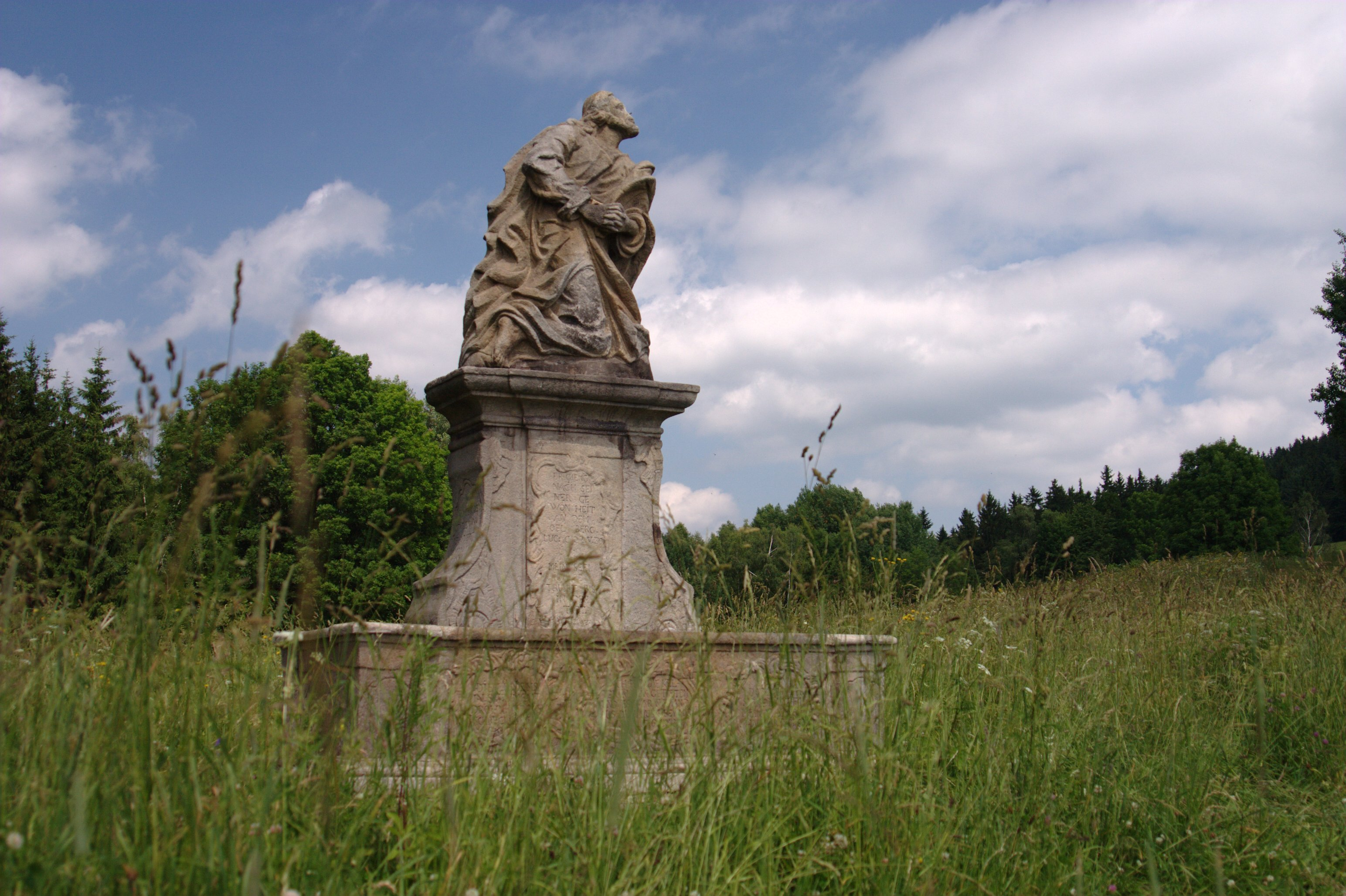 Socha Krista na hoře Olivetské